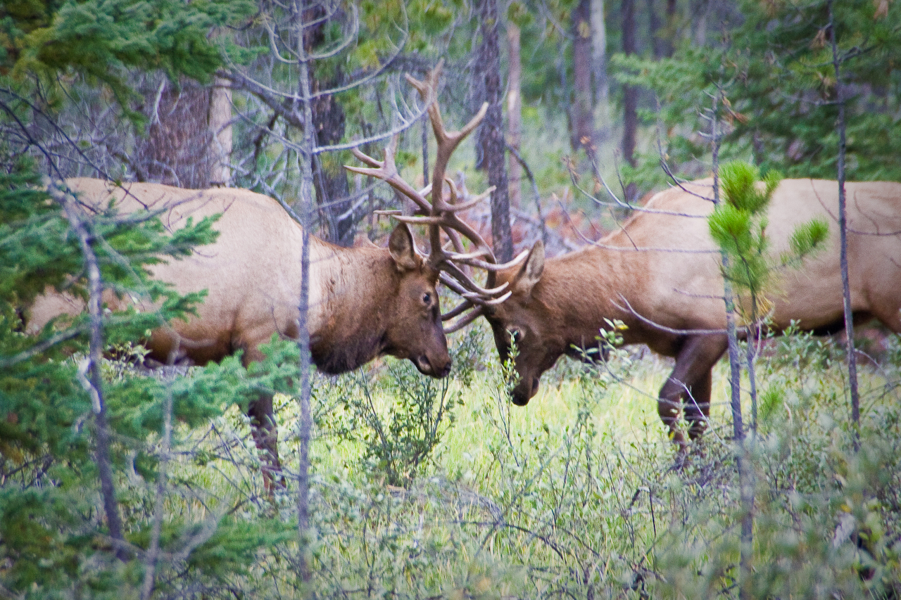 Elk sparring at Jasper National Park, Alberta, Canada.